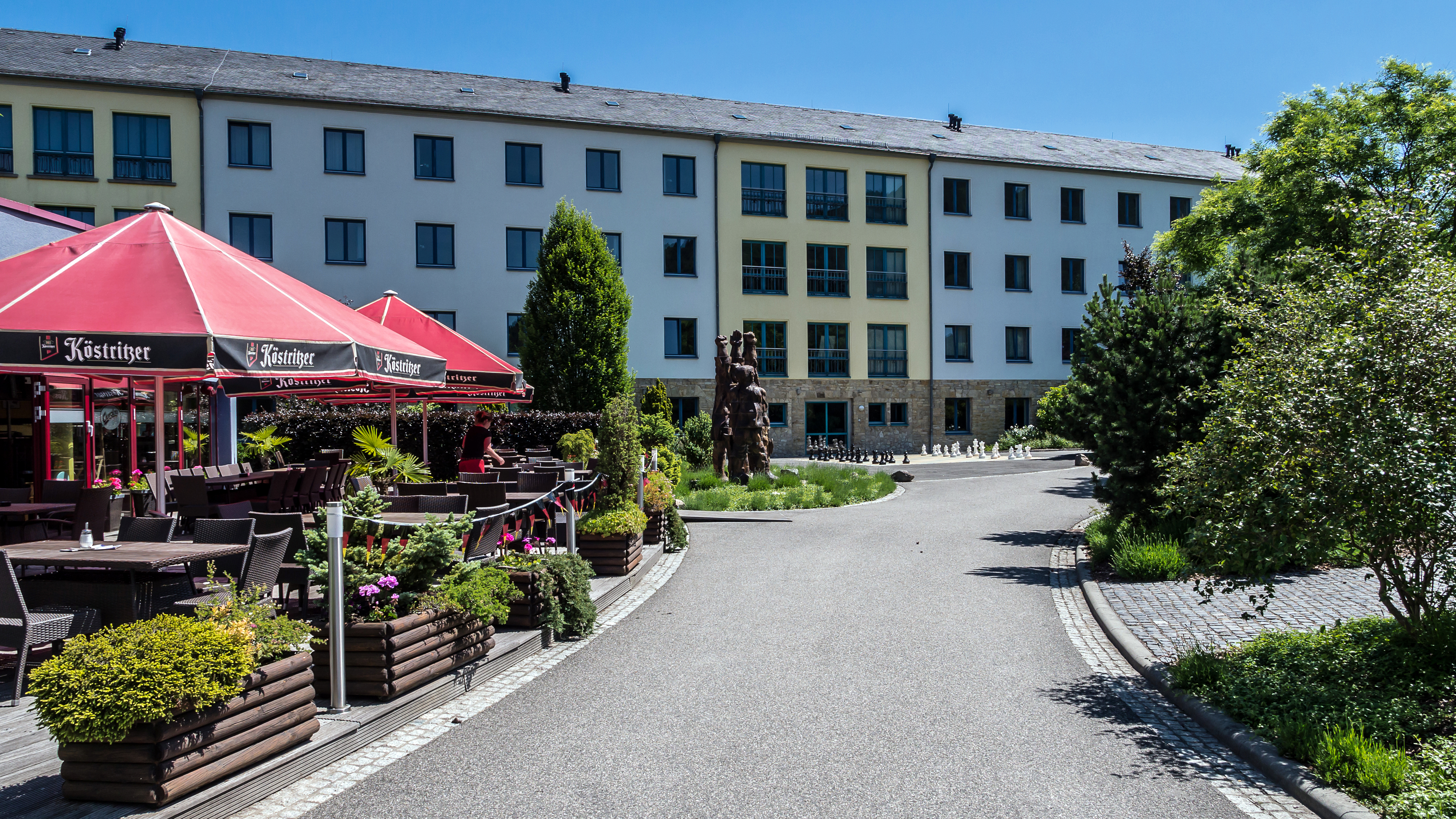 Landessportschule Thüringen